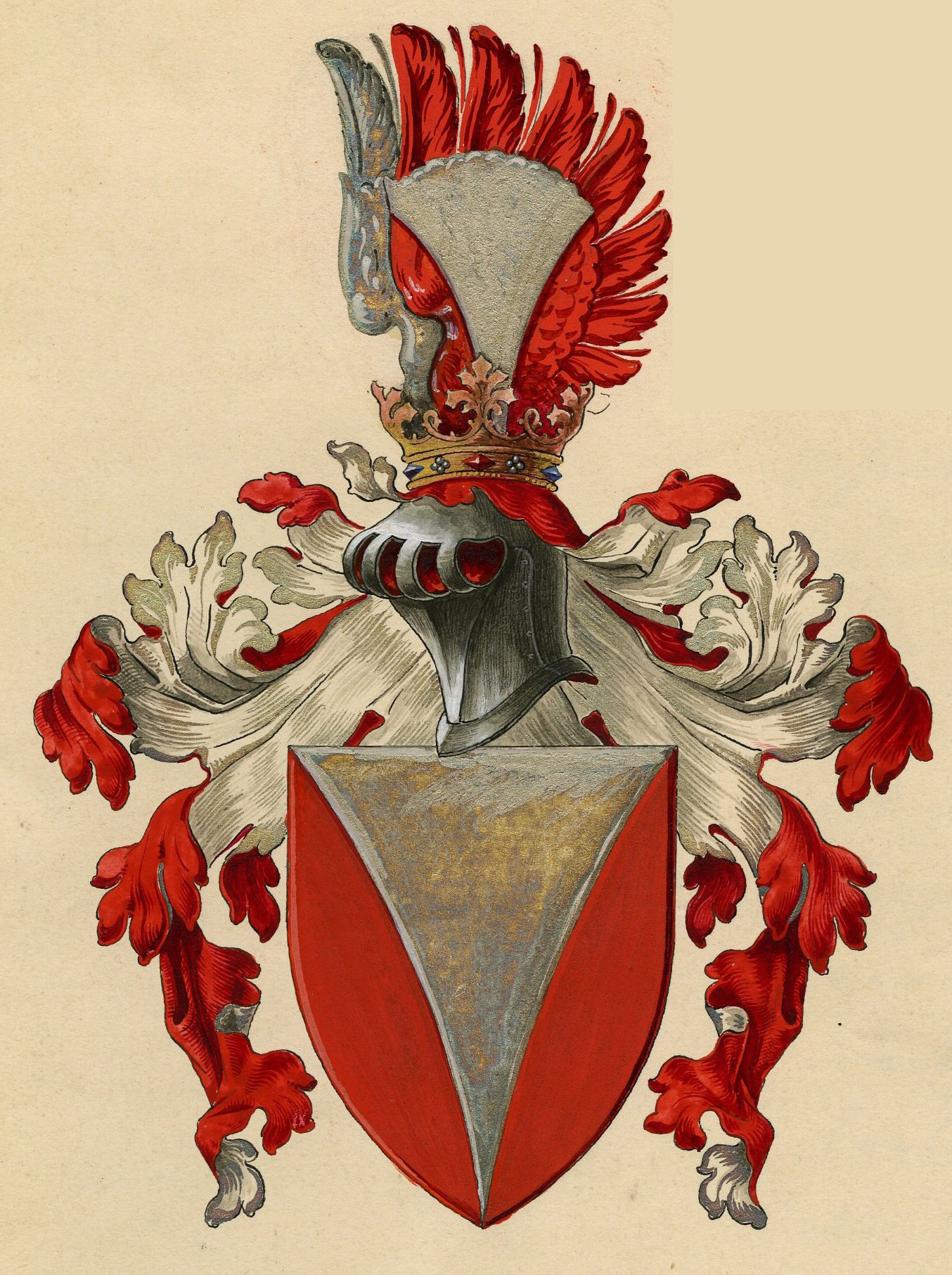 Zapský ze Zap